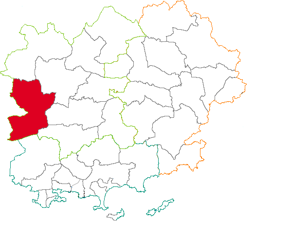 Situation du canton dans la département du Var (83), France